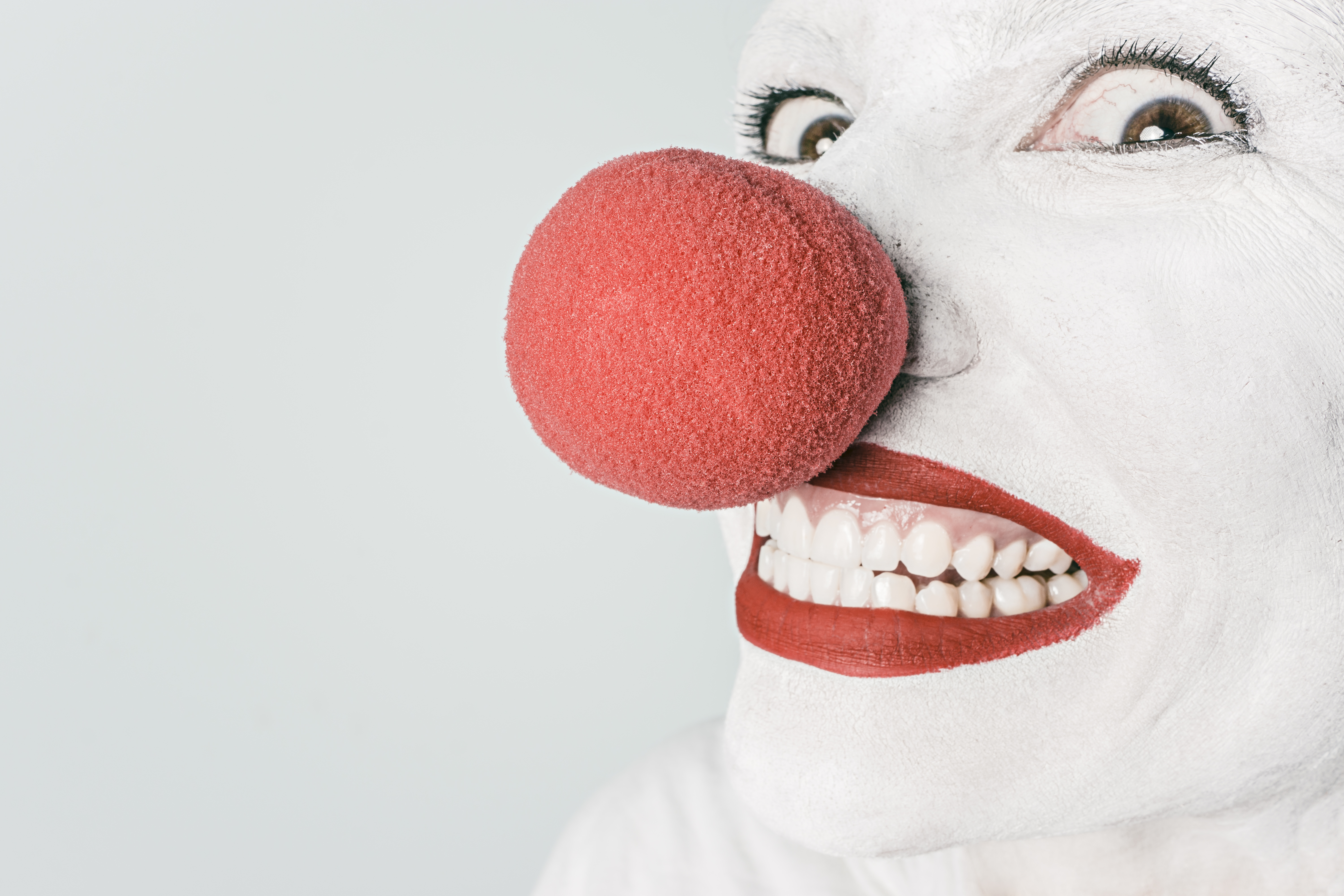 pixella15646